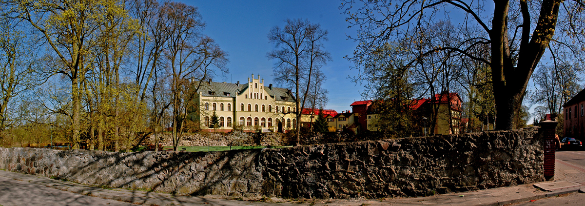 Czarne, zamek, 1395-1403